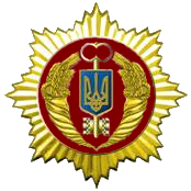 Емблема Державного агентства резерву України Опис емблеми Державного агентства резерву України Емблема Державного агентства резерву України являє собою зображення малого Державного Герба України на тлі золотого ключа в обрамленні двох золотих рогів достатку. Емблему вміщено у крузі крапового кольору, накладеного на золоту зірку з 48-ма розбіжними променями. Висота малого Державного Герба України дорівнює 3/8 діаметра крапового круга.